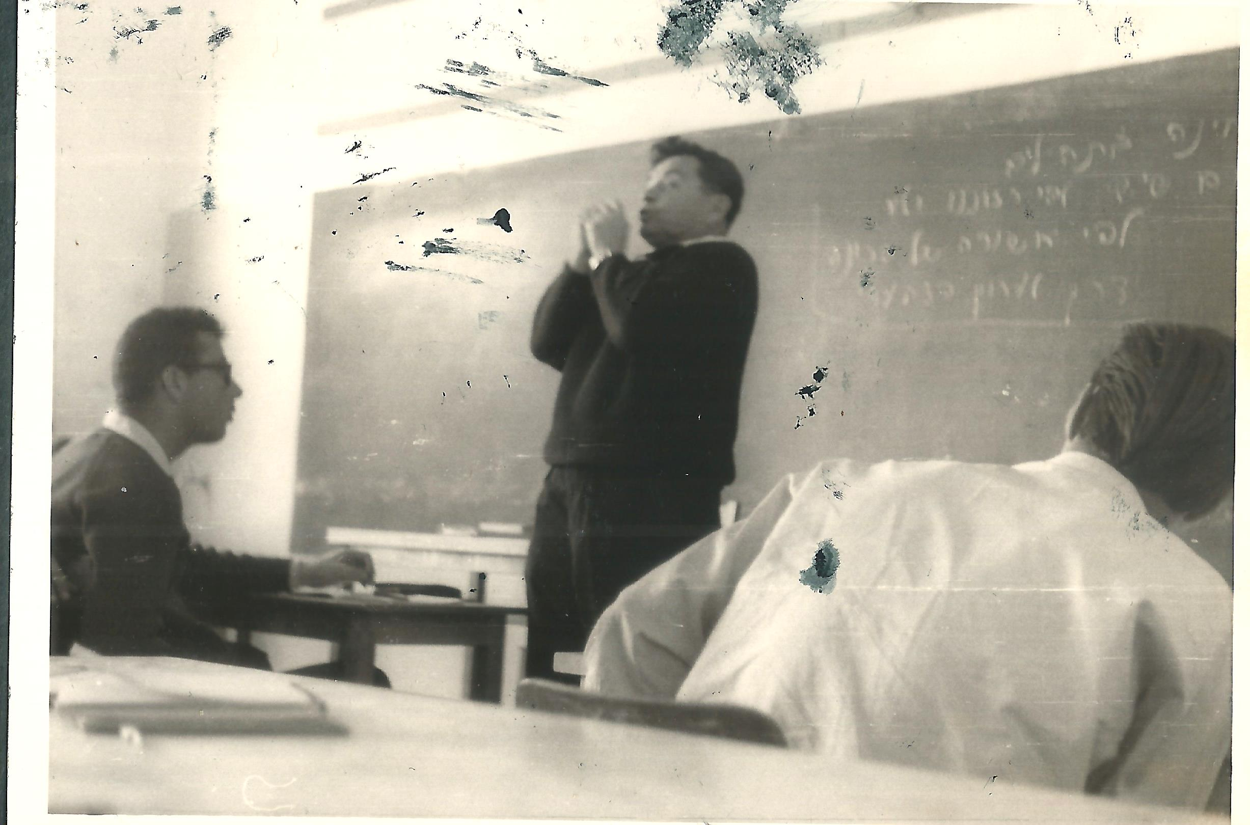 אריה לוי שריד, (במרכז התמונה) מהלך שיעור ספרות בתיכון המחוזי בעפולה, שנות ה-80